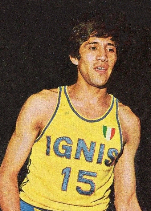 CAMPIONI dello SPORT 1973/74-Figurina n.269- RAGA -MESSICO -PALLACANESTRO